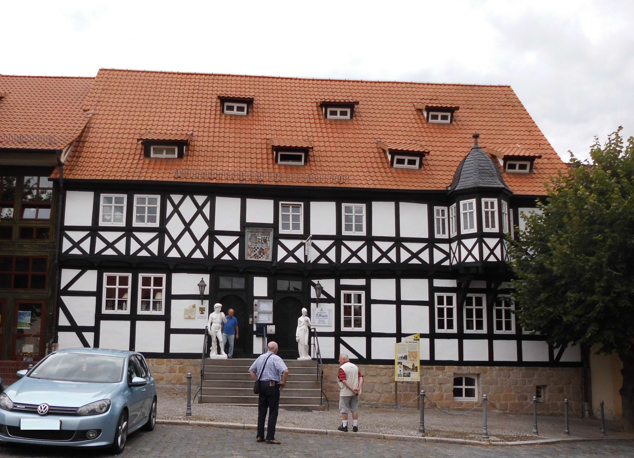 Oud stadhuis van Ballenstedt - Landkreis Harz - Saksen Anhalt - Duitsland